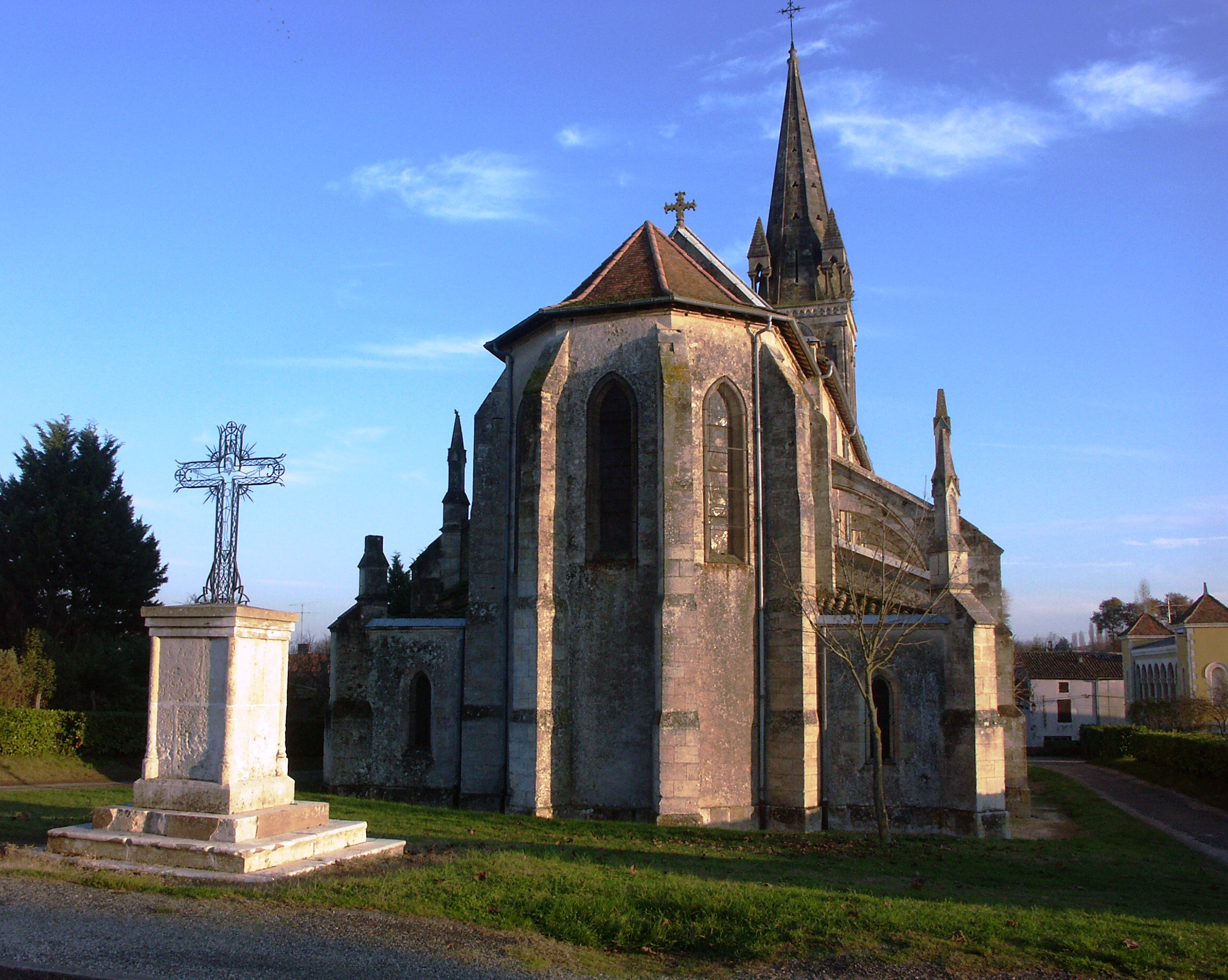 Eglise Buzet-sur-Baïse côté nord